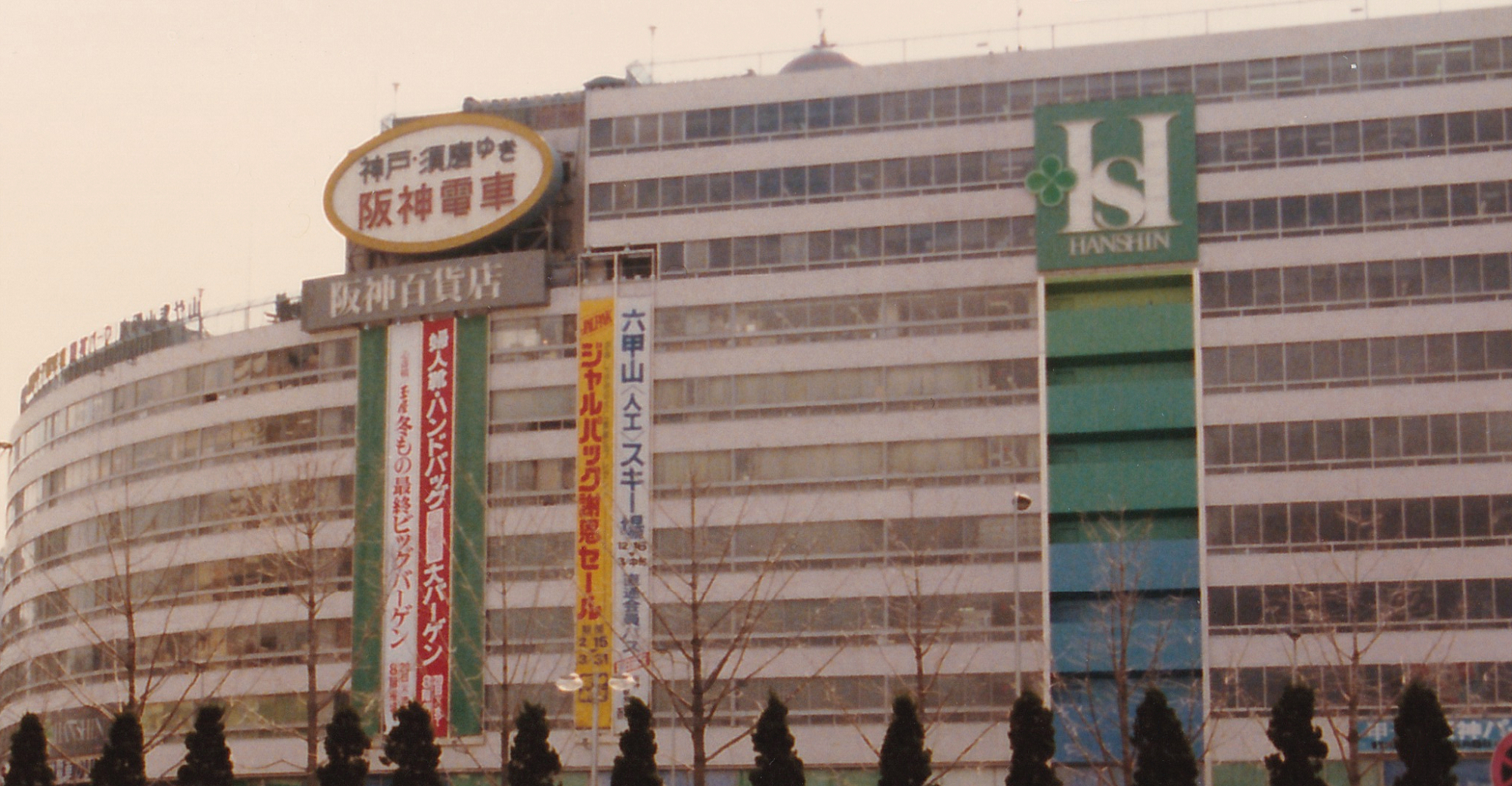 阪神百貨店と阪神梅田駅（1979年）